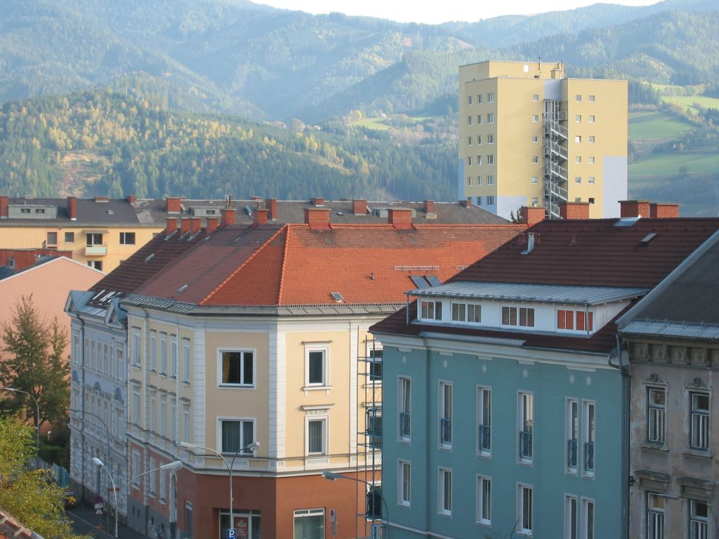 Knittelfeld Schmidtstraße